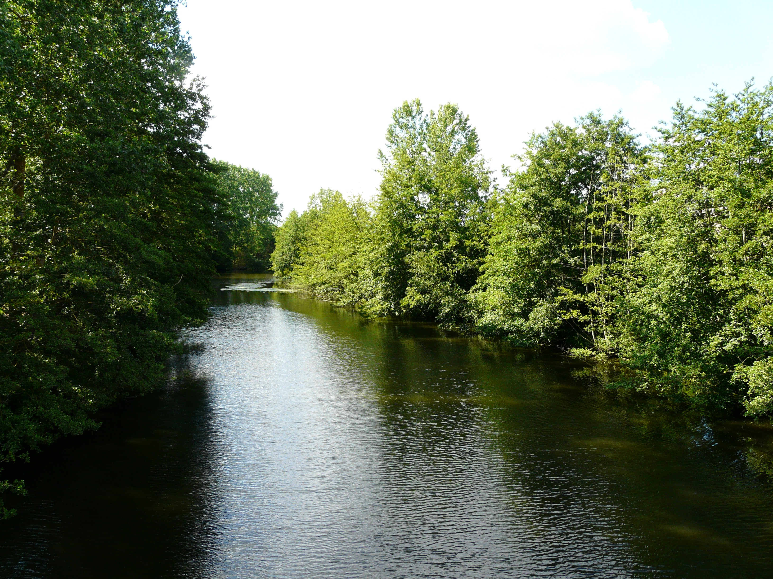 Le Thouet en aval du pont de Vernay, Airvault, Deux-Sèvres, France